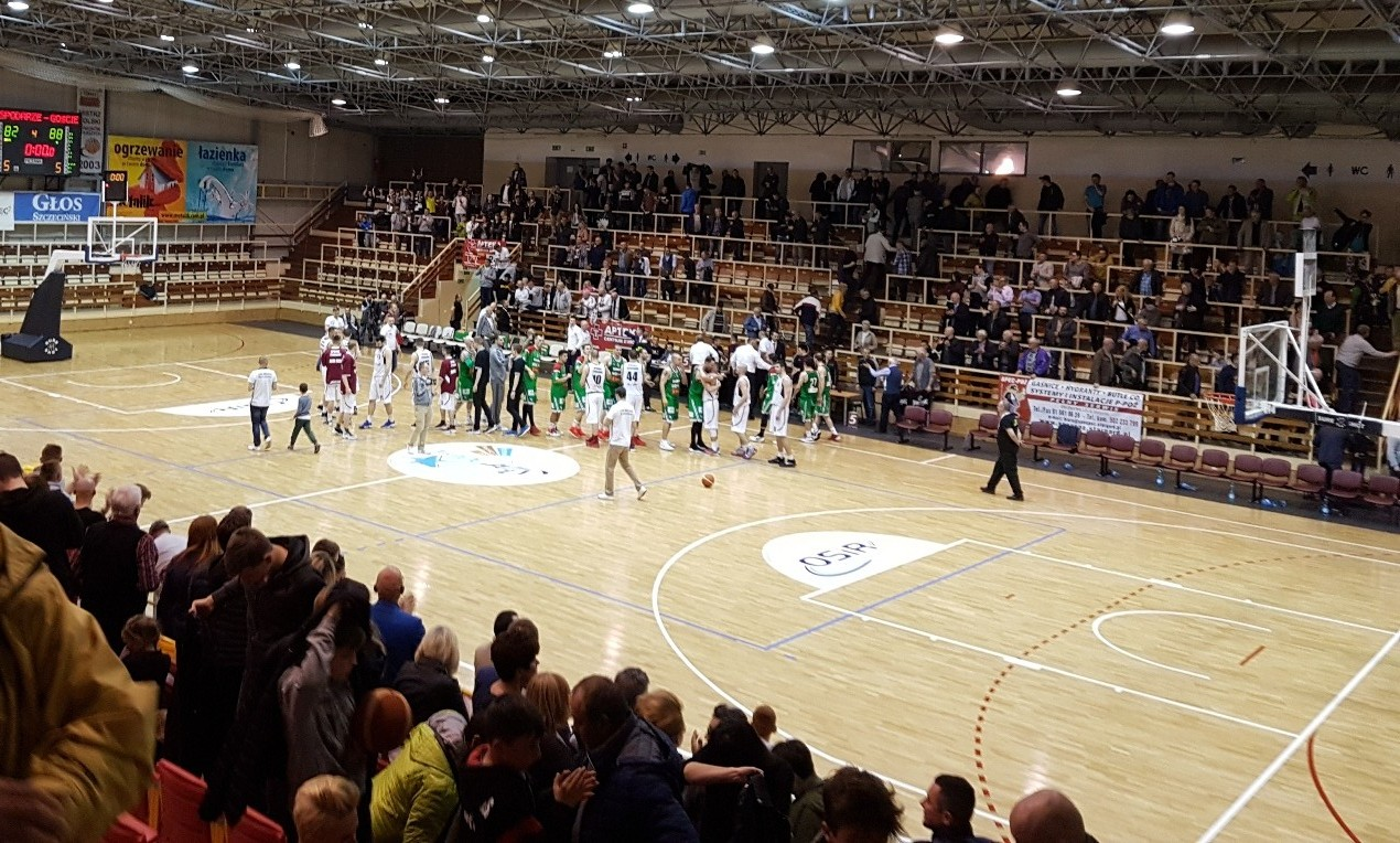 Stargard, 06.05.2017r. Spójnia w trzecim meczu półfinałowym Legią